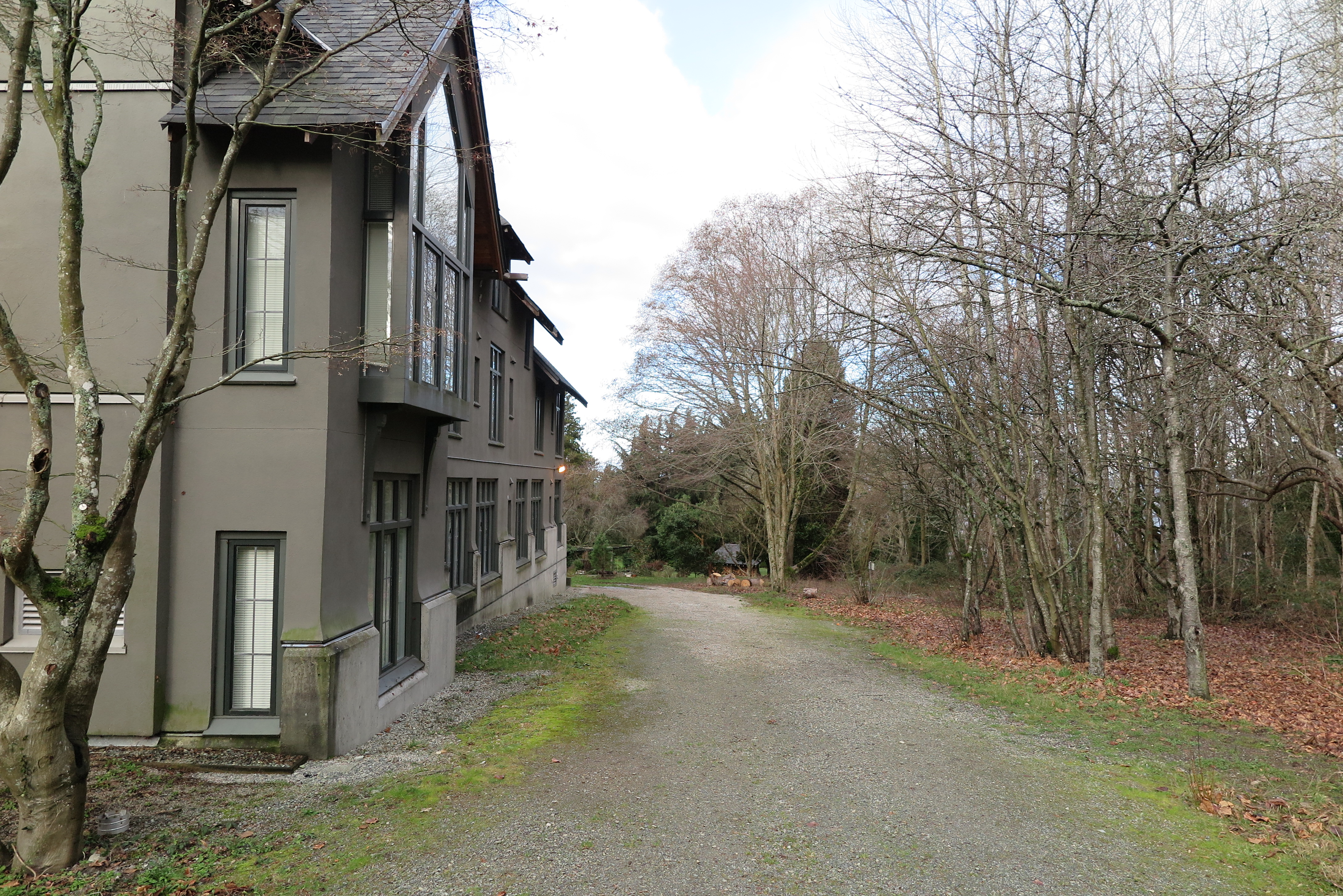 L'edificio residenziale Nord del complesso del Green College, University of British Columbia, visto dal bosco che degrada verso l'oceano